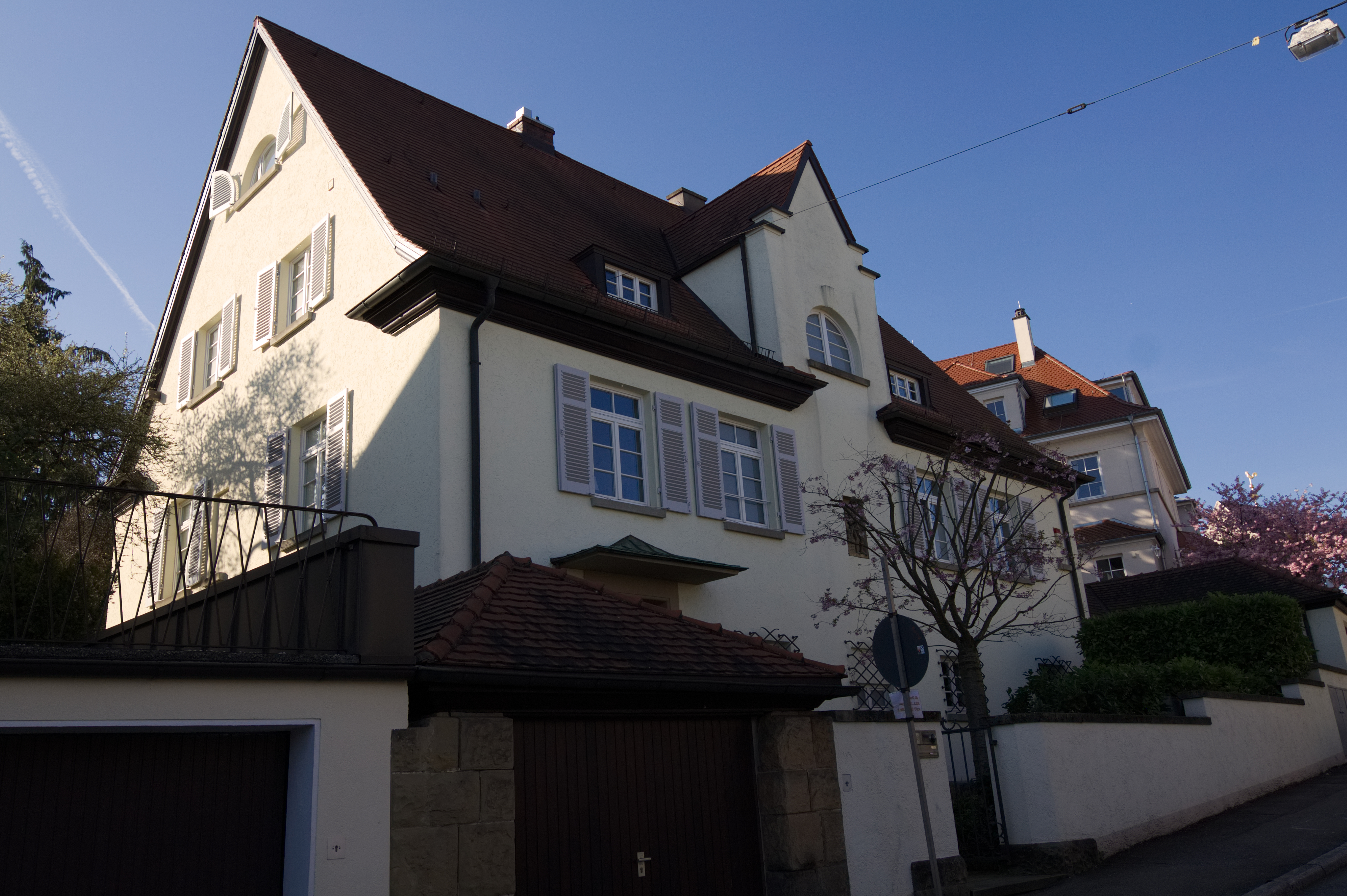 Wohnhaus Adolf-Kröner-Str. 18, Stuttgart. Erbaut 1926, 1938 von Schlösser und Weirether im Heimatstil. Geschützt nach § 2 DSchG.